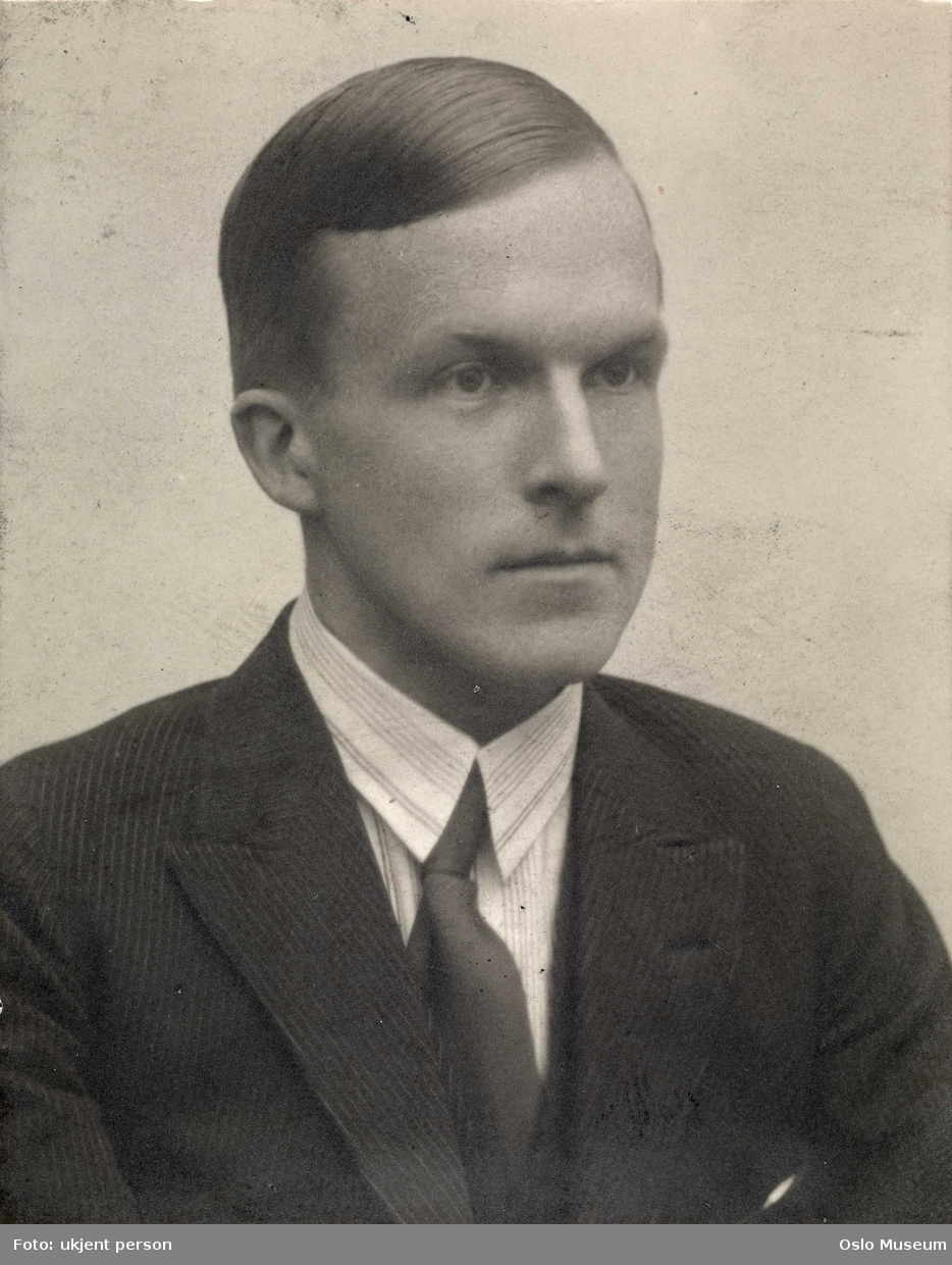 Gustav Guldberg (1897–1938), norsk lege (patolog) og professor.